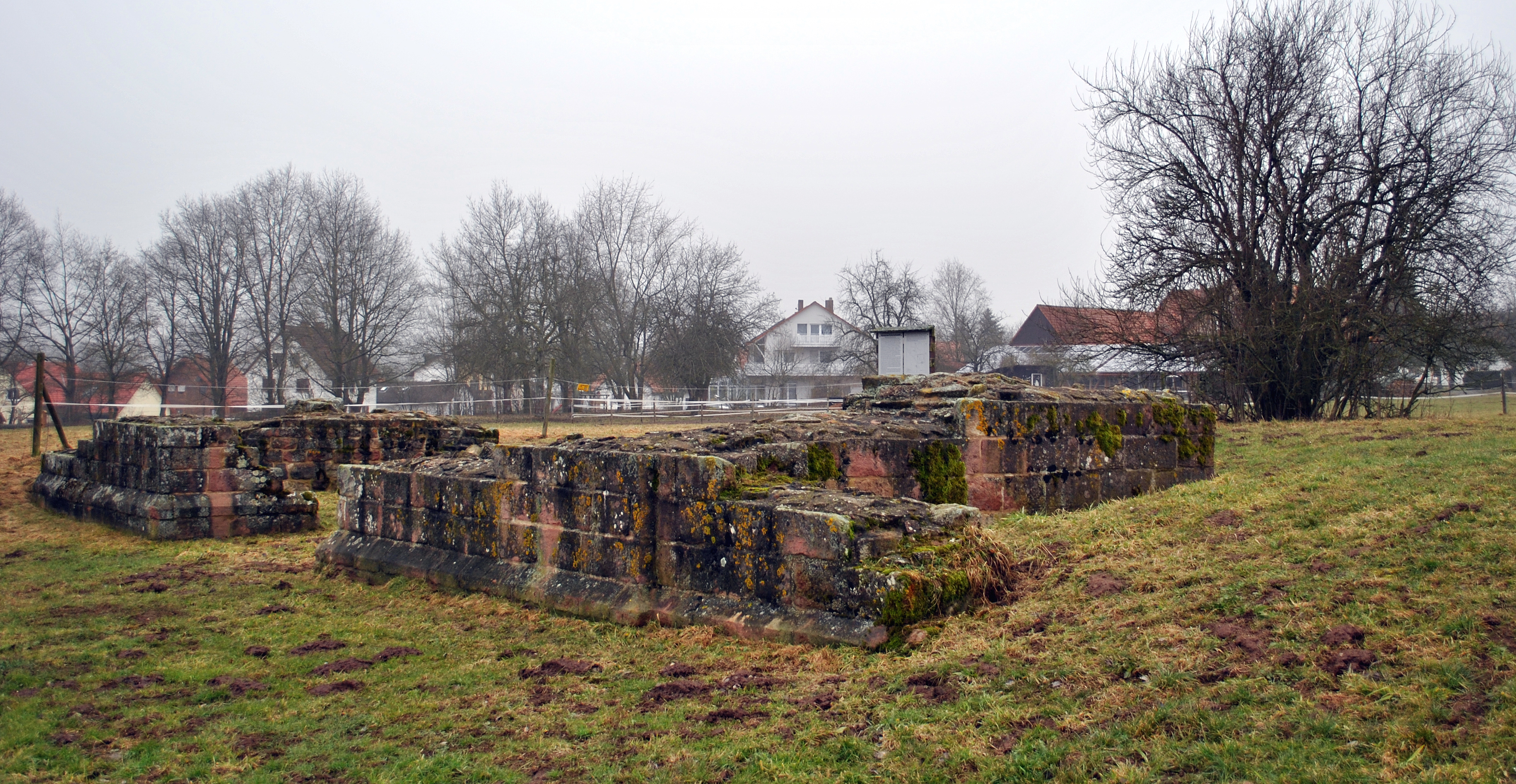 Porta Principalis Dextra des Kastells Oberscheidental am Odenwaldlimes